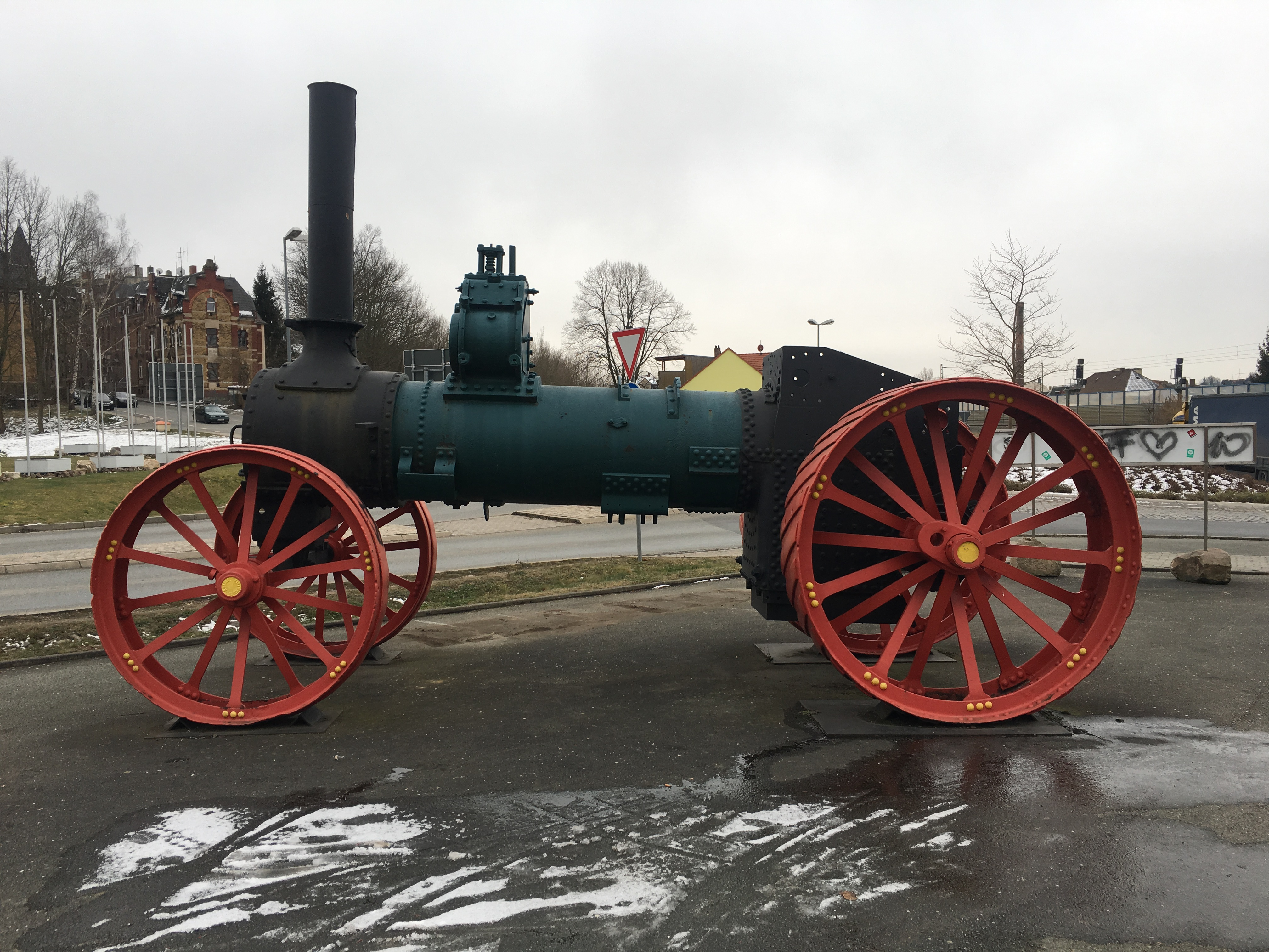 Dampfpfluglokomotive A. Heucke 656/1921 (2018)